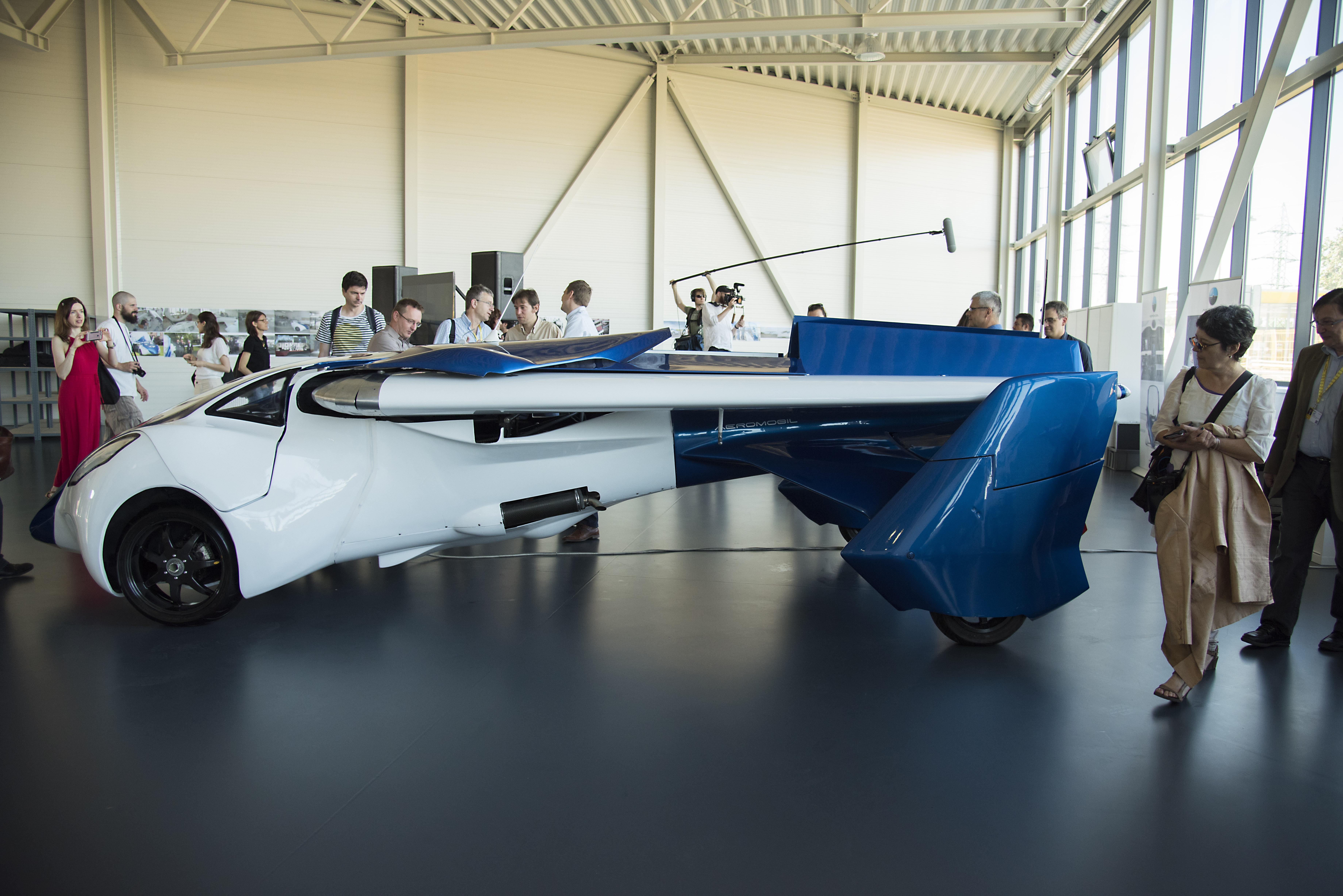 ph: halime sarrag